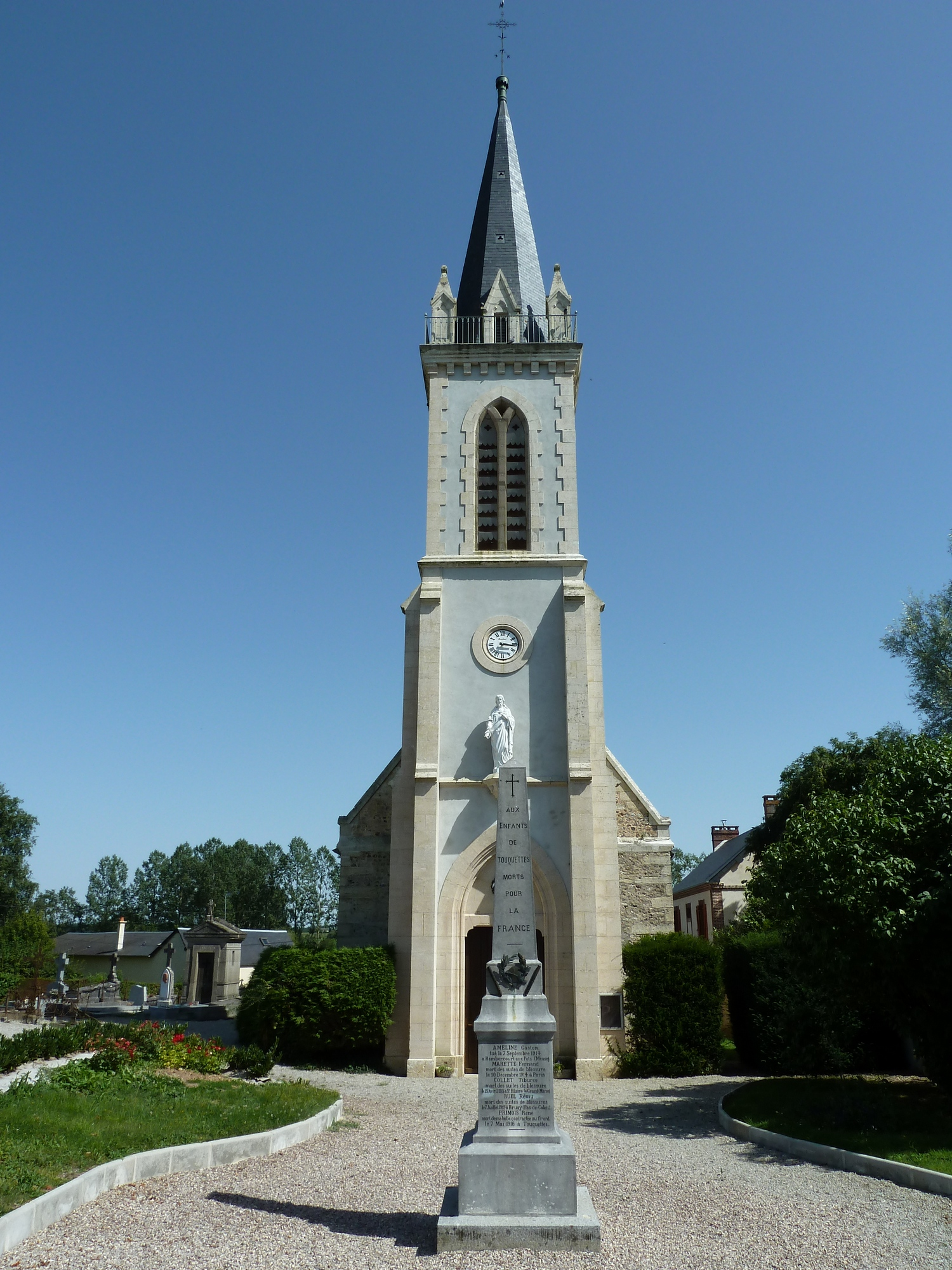 Façade principale de l'église Notre-Dame de Touquettes (61).